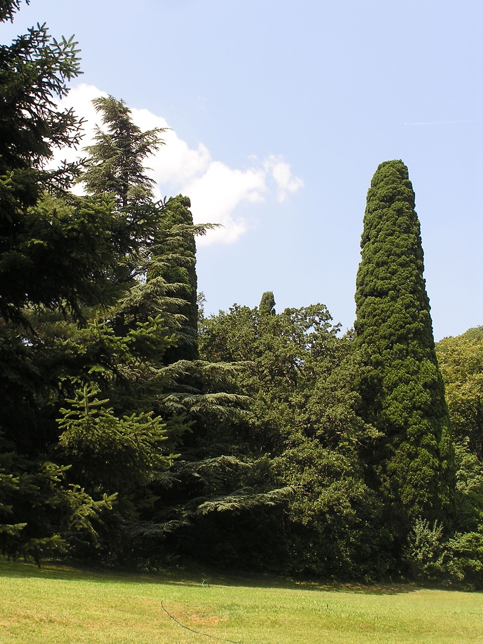 Алупка. Ворнцовский парк